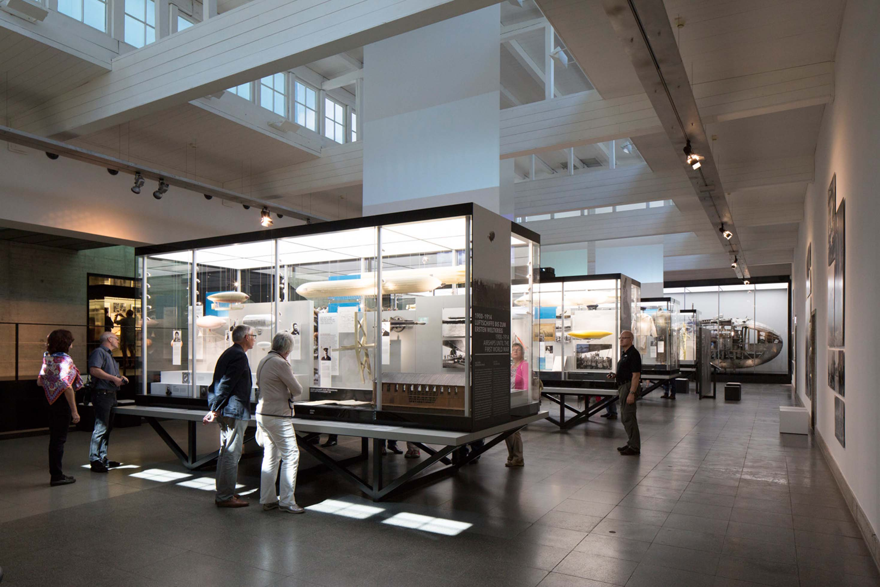 Geschichte der Luftschiffe, © Zeppelin Museum, Foto: Myrzik